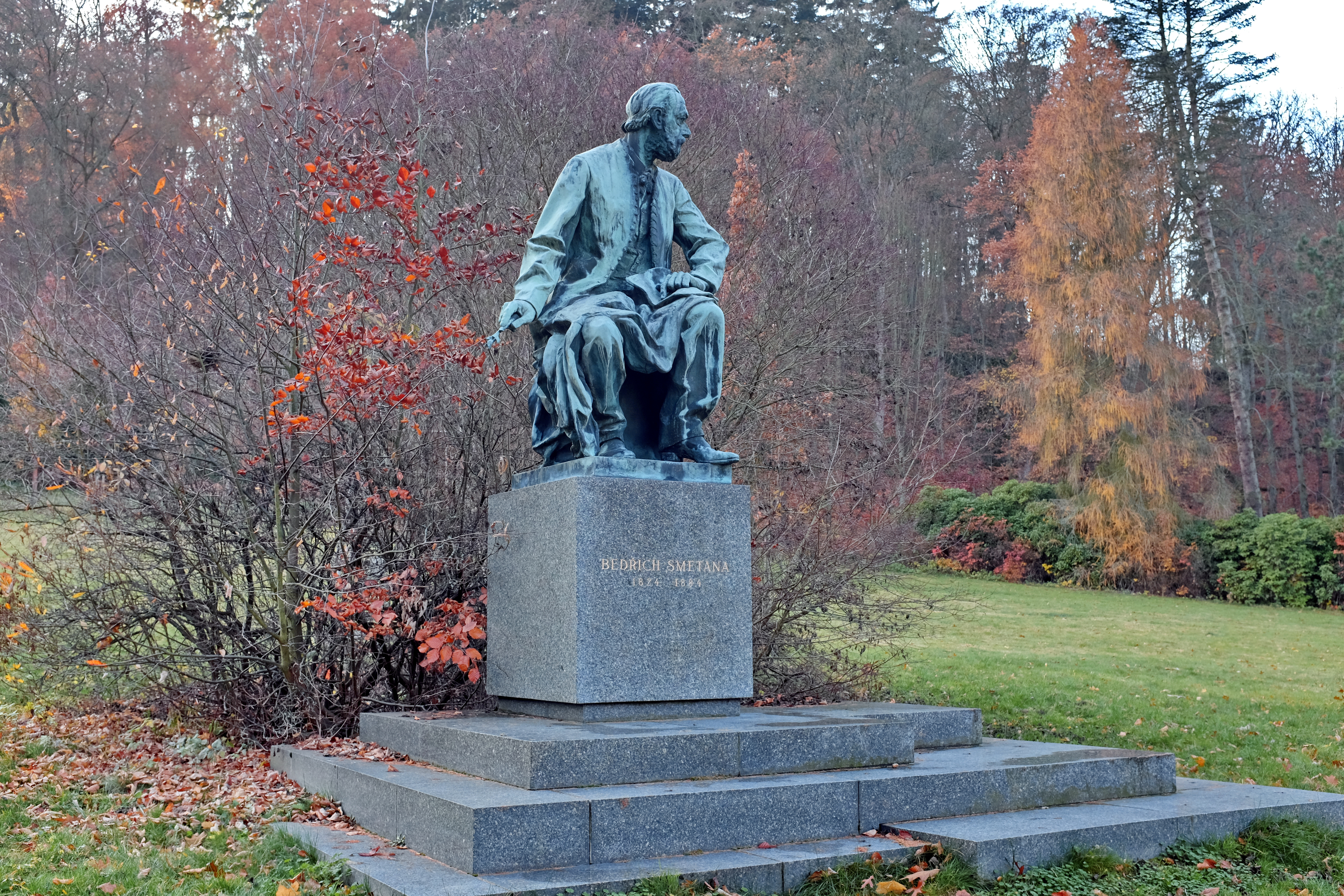 Pomník Bedřicha Smetany, v parku severně od Poštovního dvora, parc. 786/1, Karlovy Vary.